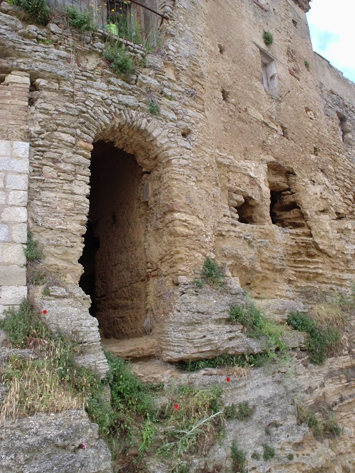 Autore: Rocco Stasi. Fonte: Fatta da me. Saracena: ingresso di una casa-grotta. Licenza d'uso:GFDL, sono l'autore.